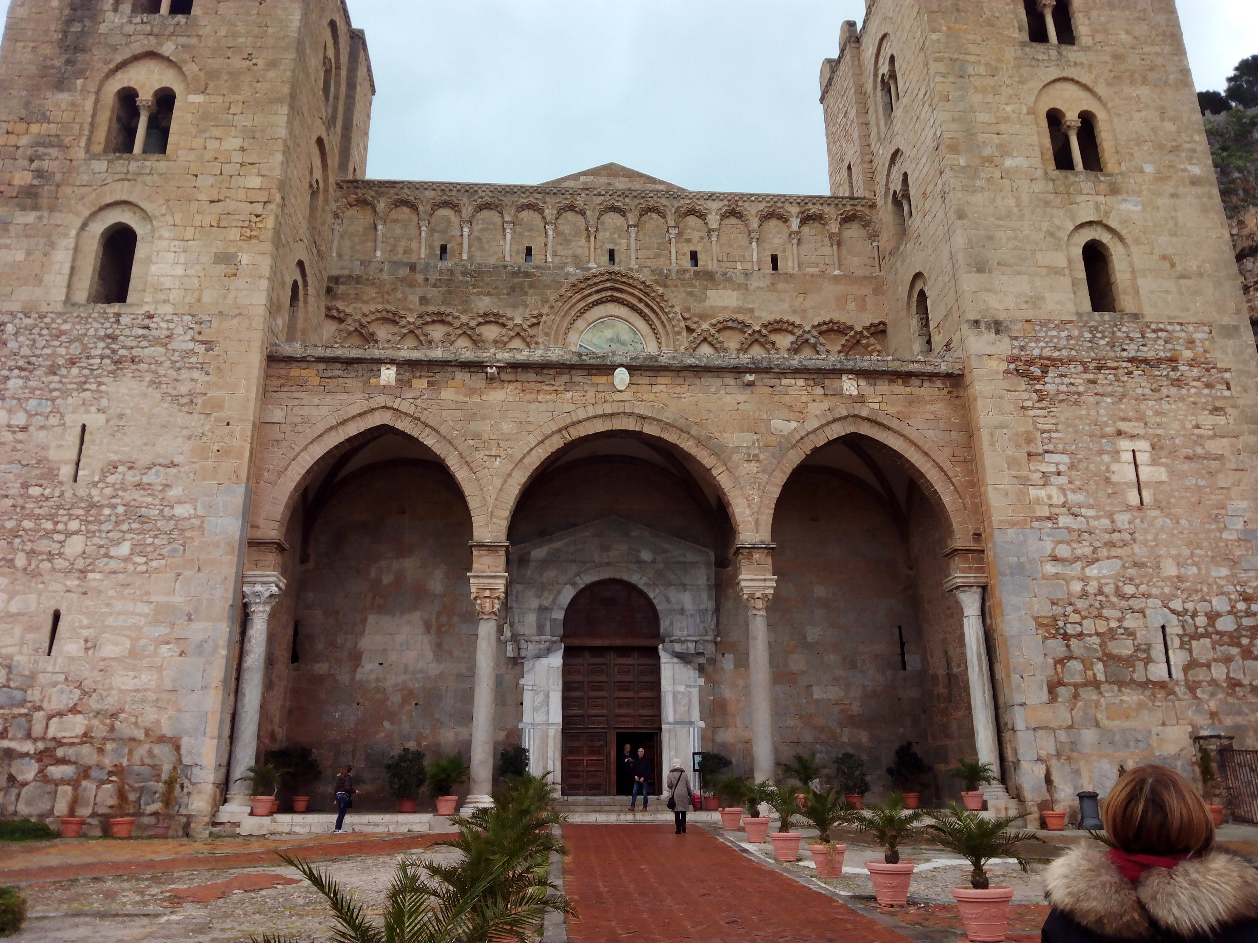 Katedralaren portada